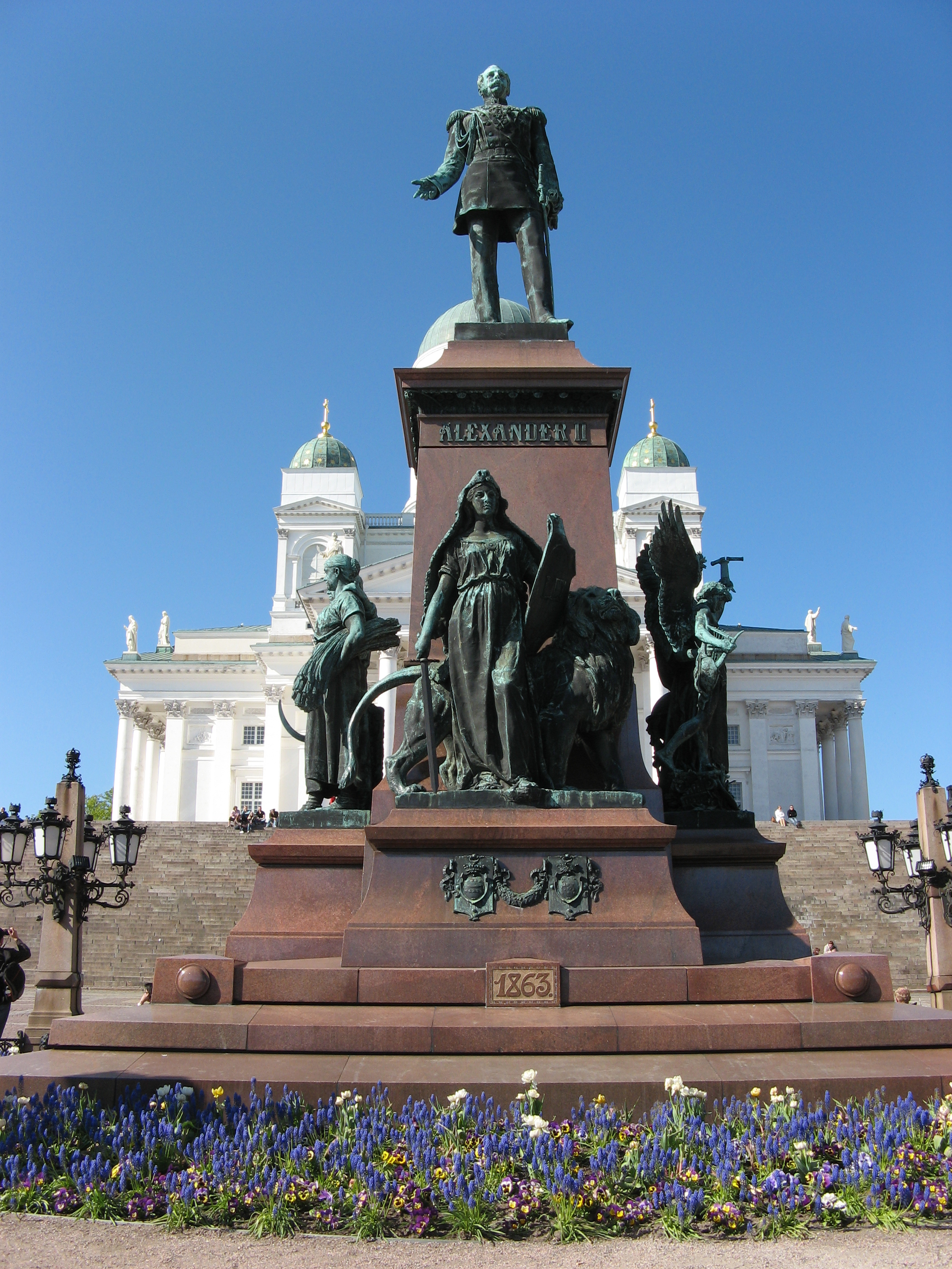 ALEXANDER II